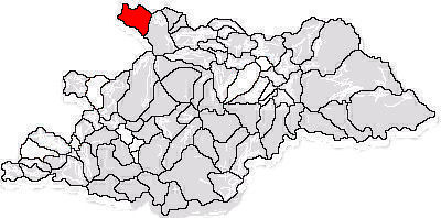 Obec Remeti na mapě župy Maramureš, Rumunsko